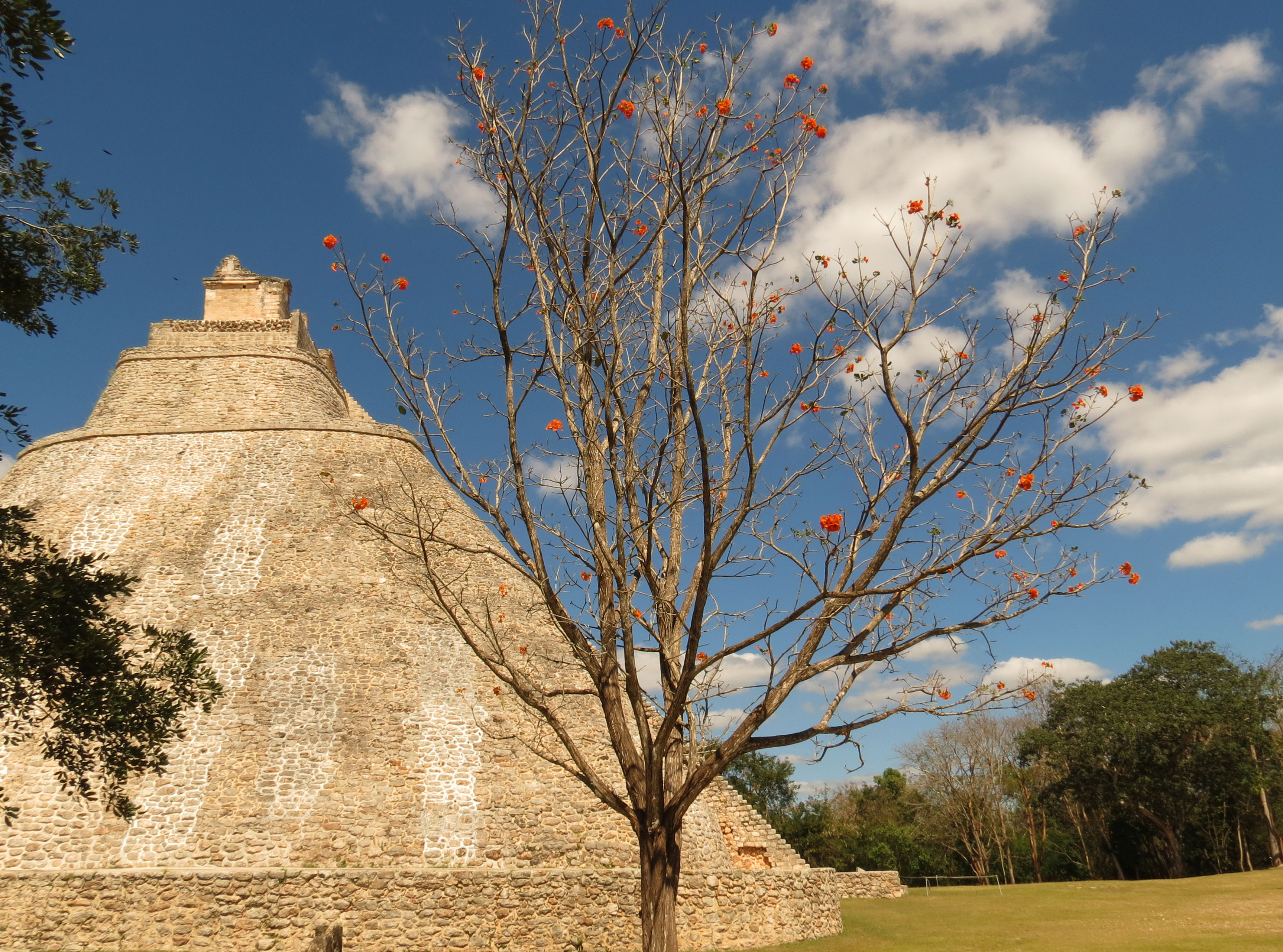 Cordia dodecandra. Sitio arqueológico Uxmal, Yucatán, México.